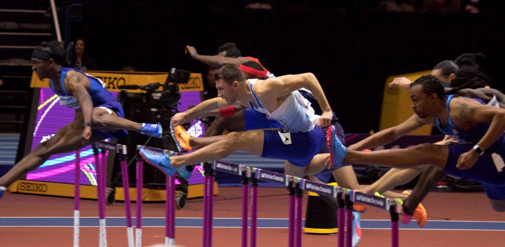 WK040221 finale 60mH